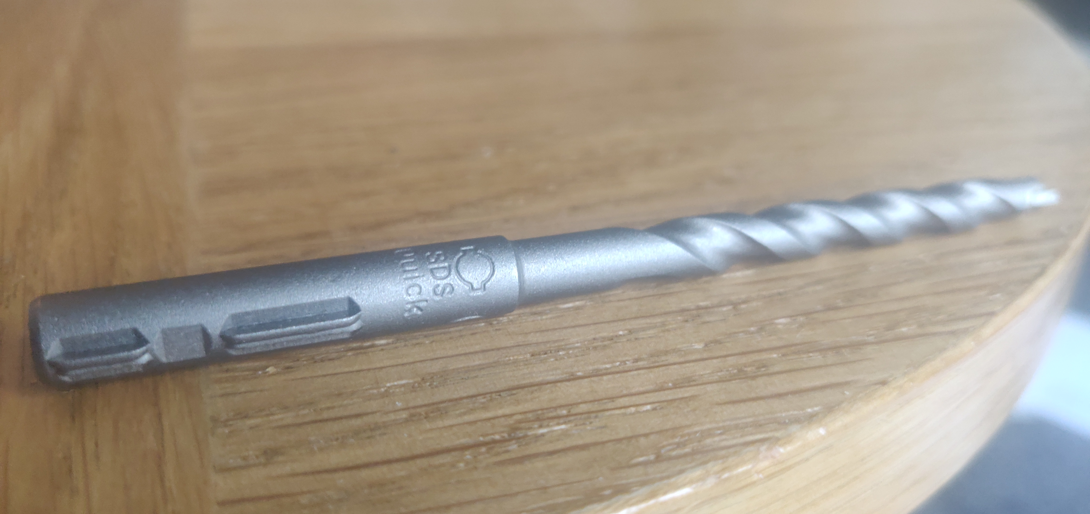 En borr med SDS-Quick verktygsfäste. Borren är av fabrikat Bosch